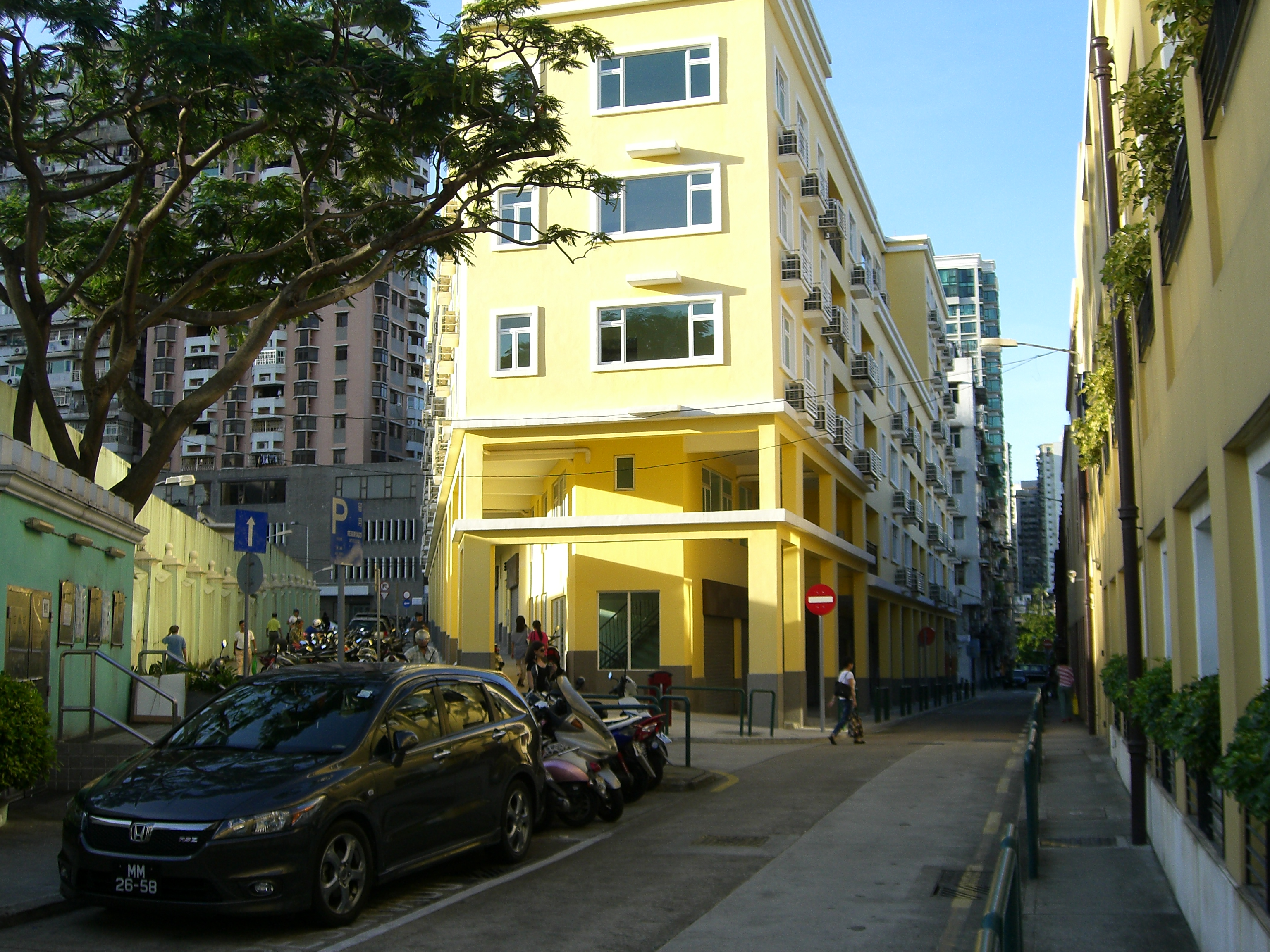 中文（香港）: 塔石街